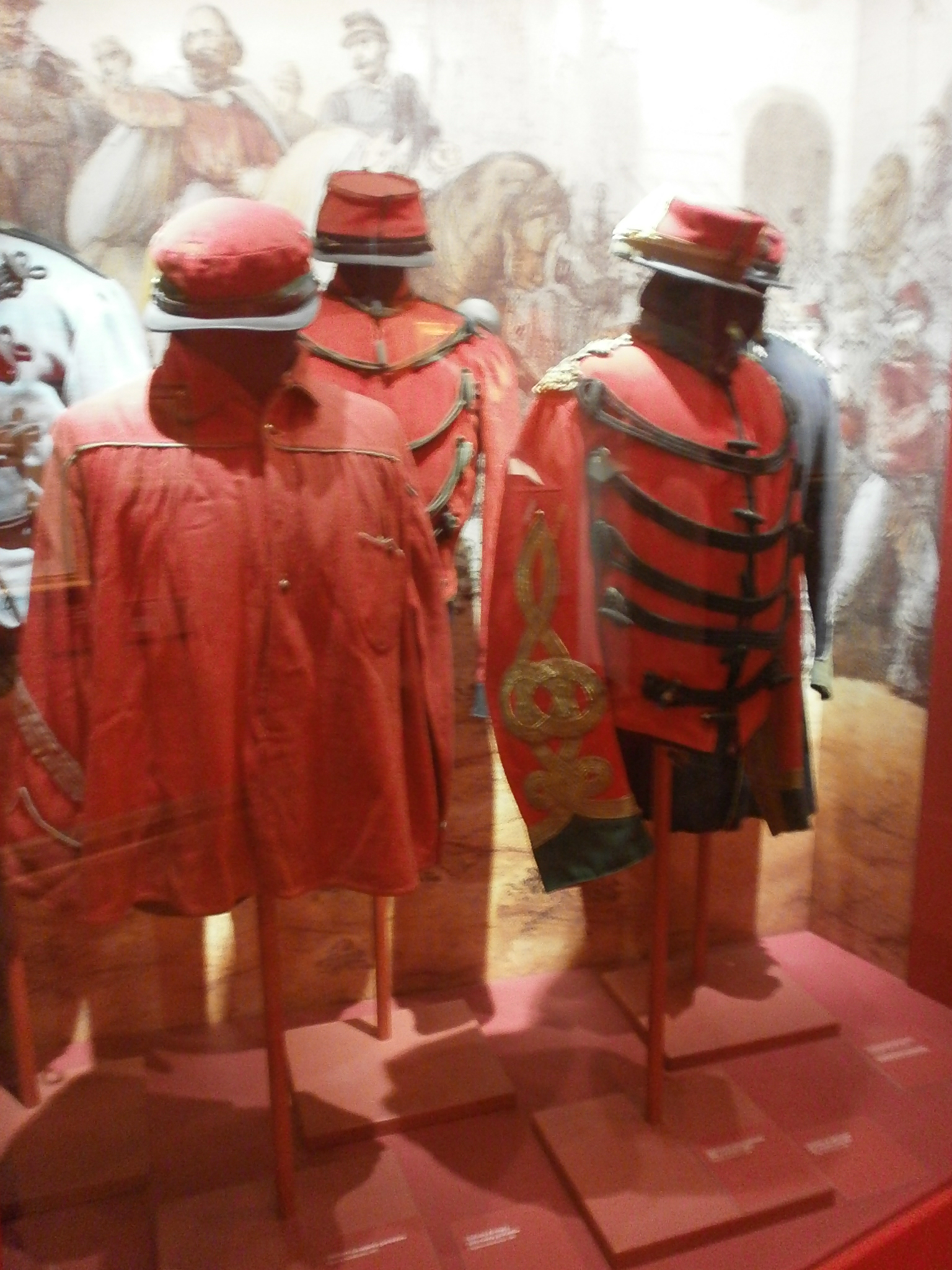 Divise delle truppe garibaldine - Museo del Risorgimento di Milano